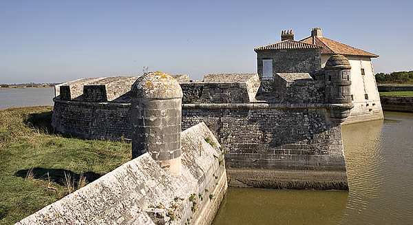 Fort Lupin - Charente-Maritime Photo issue de ma banque d'images : Pep.per 15 octobre 2006 à 00:42 (CEST)